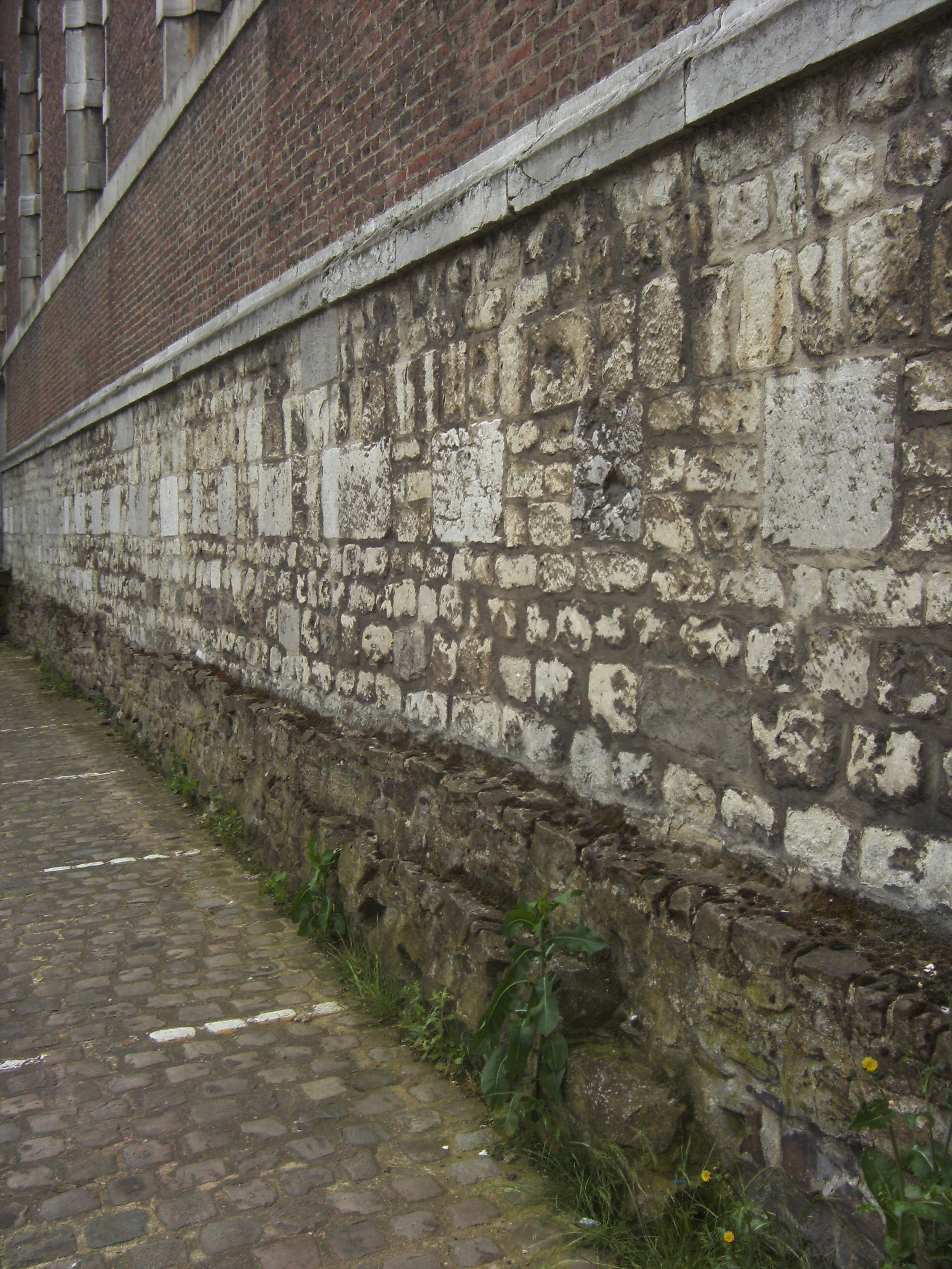 Jumet (Charleroi - Belgique) - Église Saint-Sulpice (1750-1753) - façade nord - fondations des édifices précédents